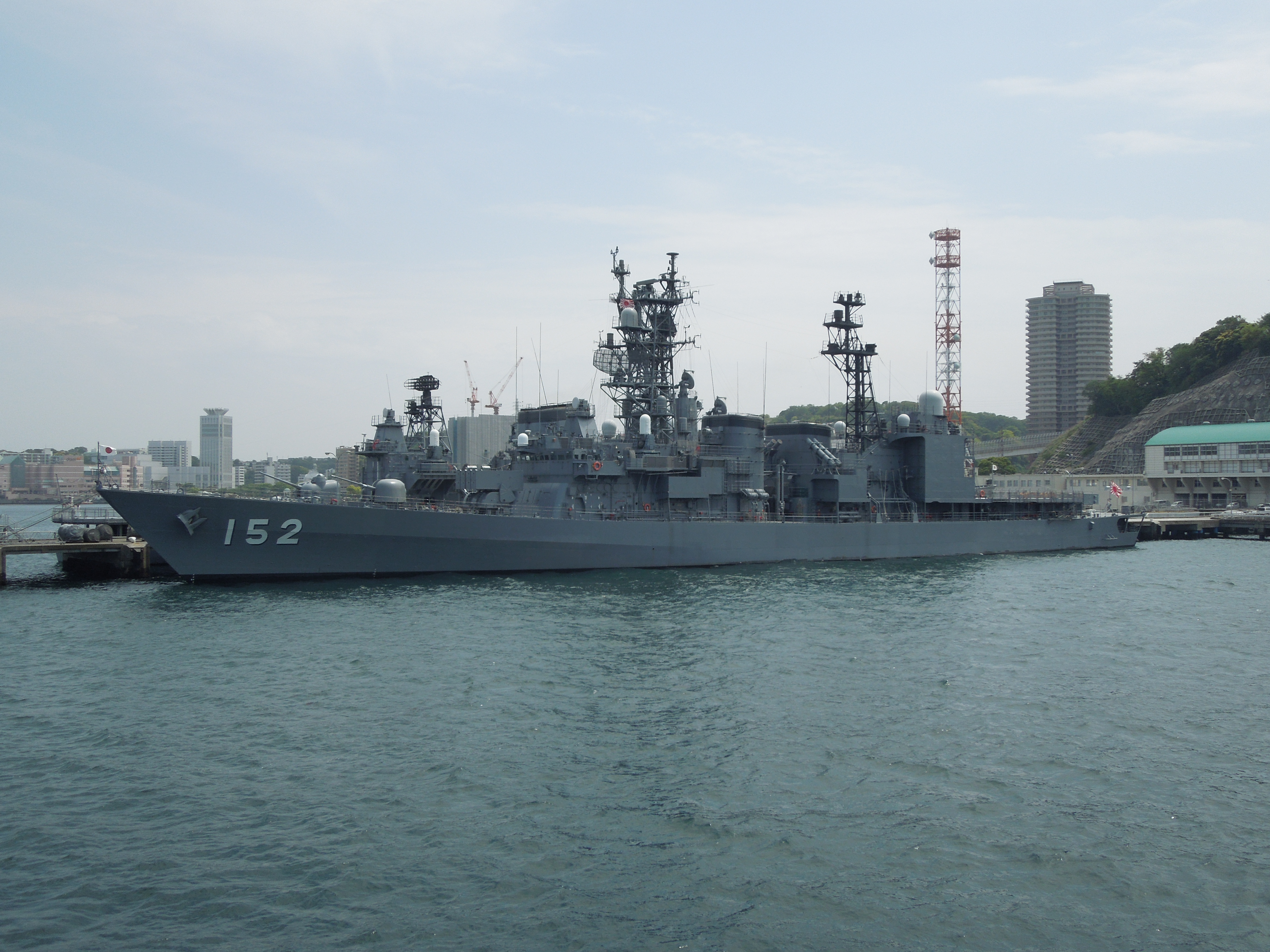 横須賀・吉倉桟橋に停泊中の護衛艦やまぎり。